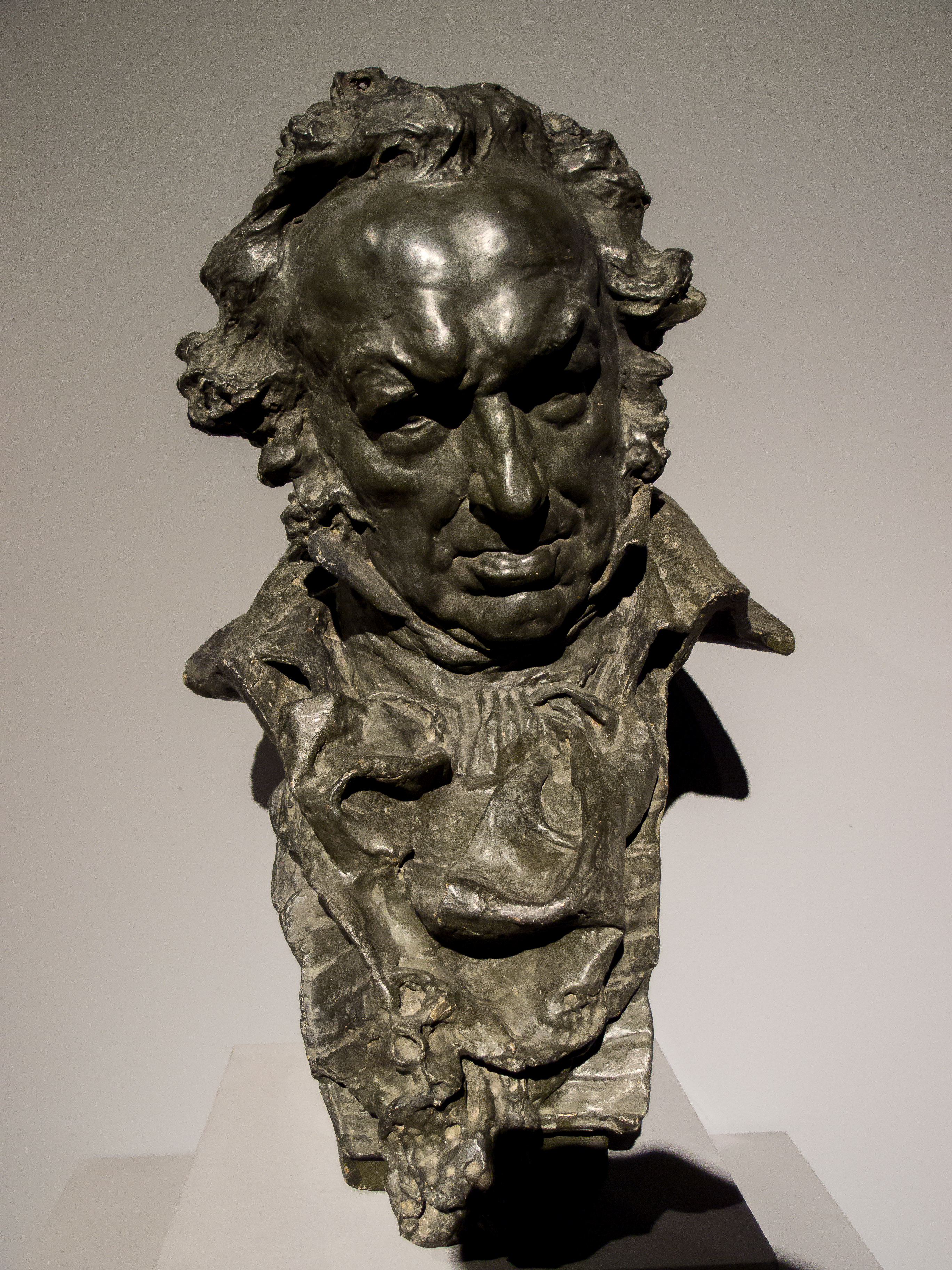 Busto del pintor español de orígen aragonés Francisco de Goya y Lucientes (1746-1828).